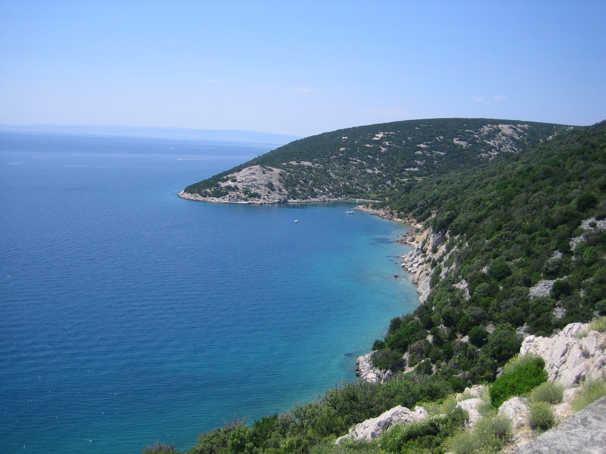 Bild selbst fotografiert, Eine_Ansicht_von_der Insel Rab